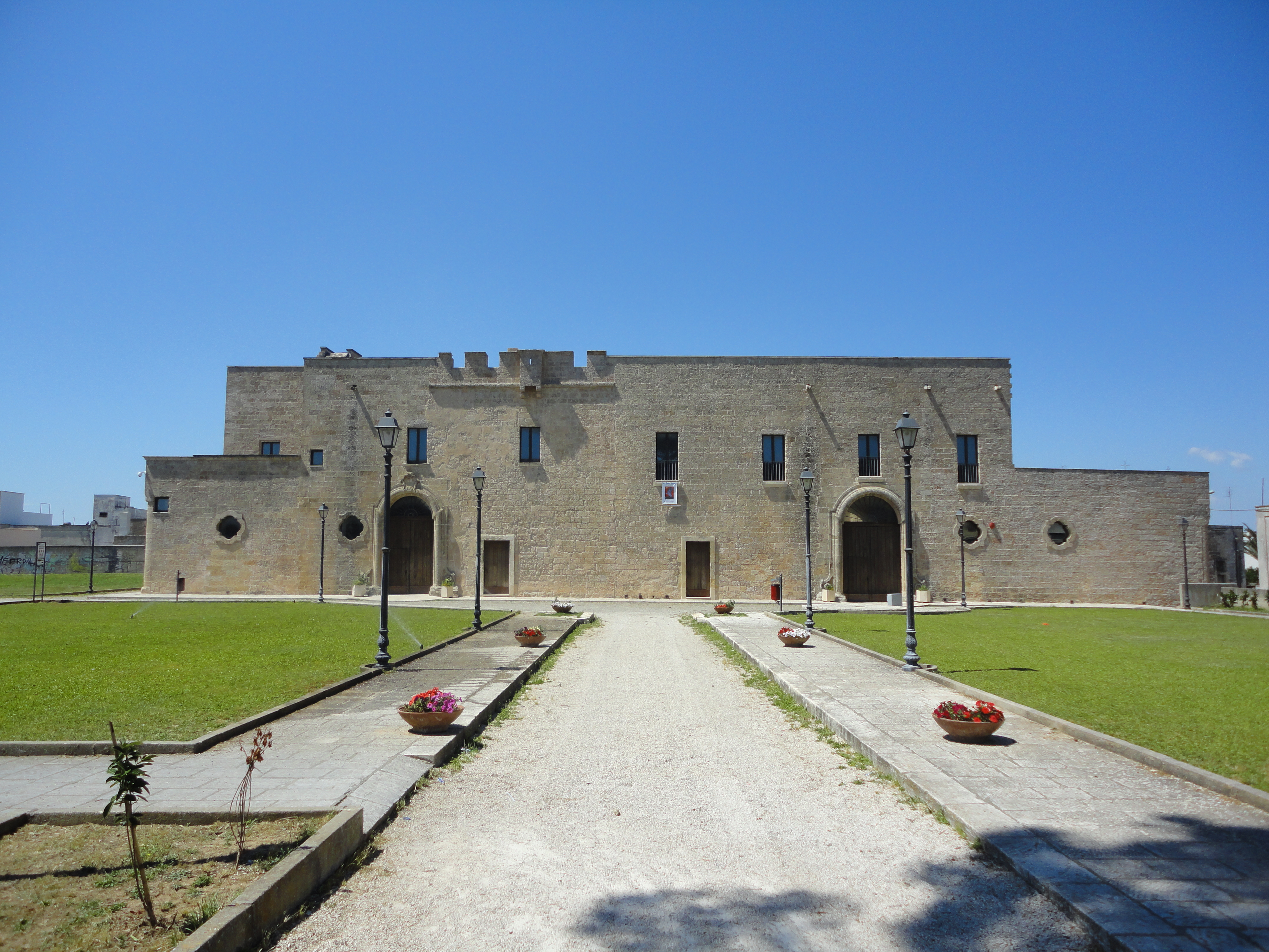 Palazzo baronale di Collepsso, Lecce